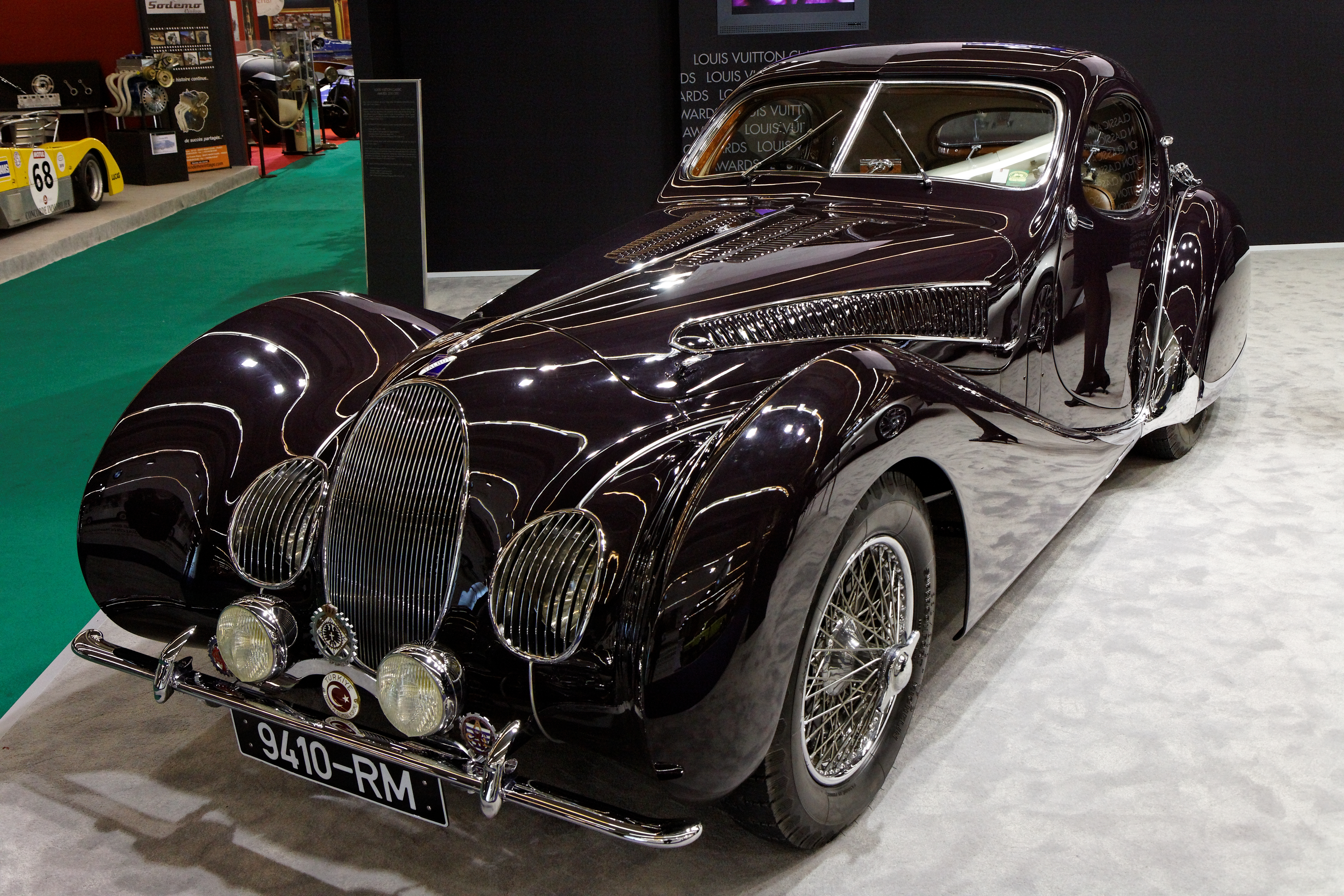 Photographie prise lors du salon rétromobile 2011 à Paris, porte de Versailles.